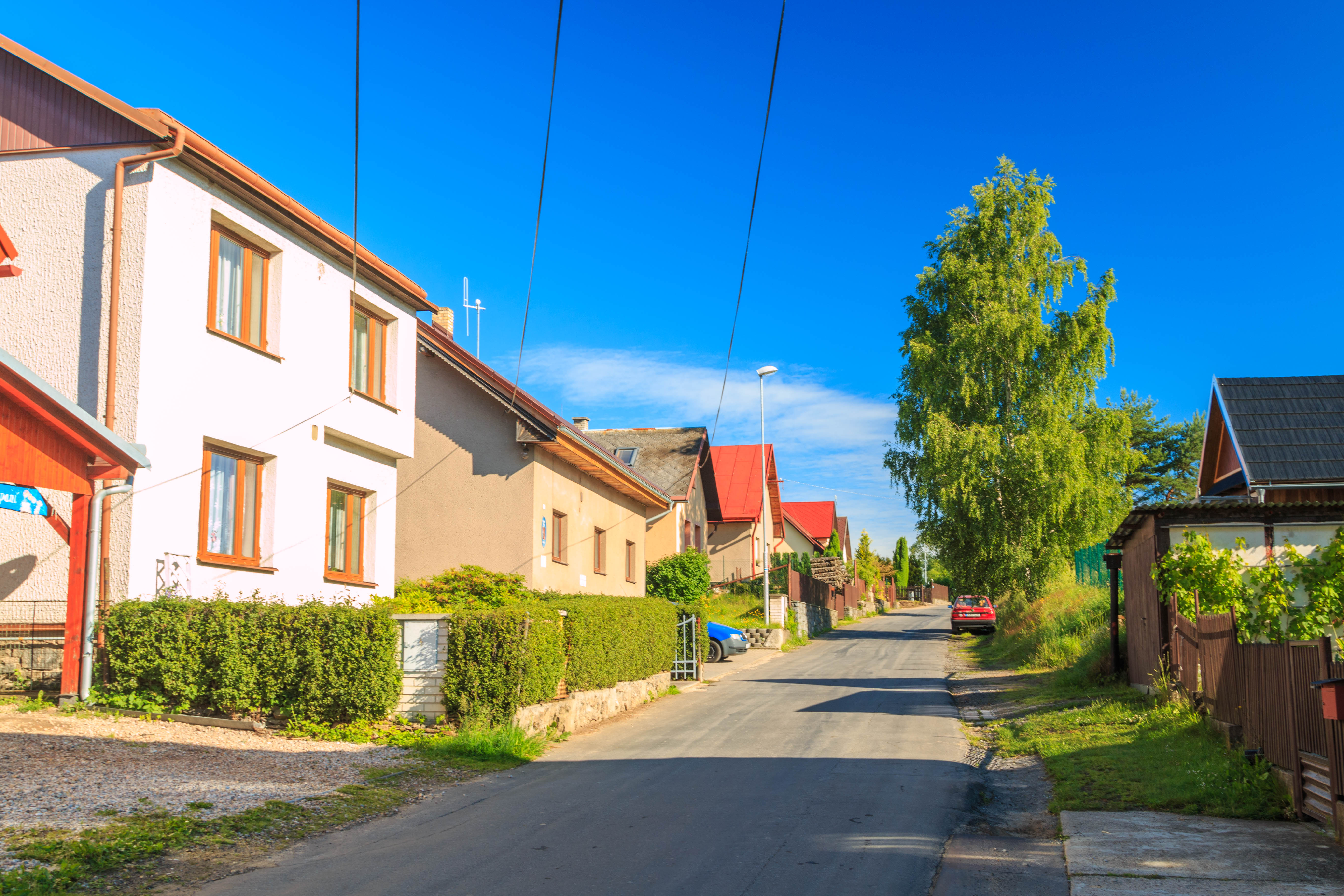 Hamry obecní úřad